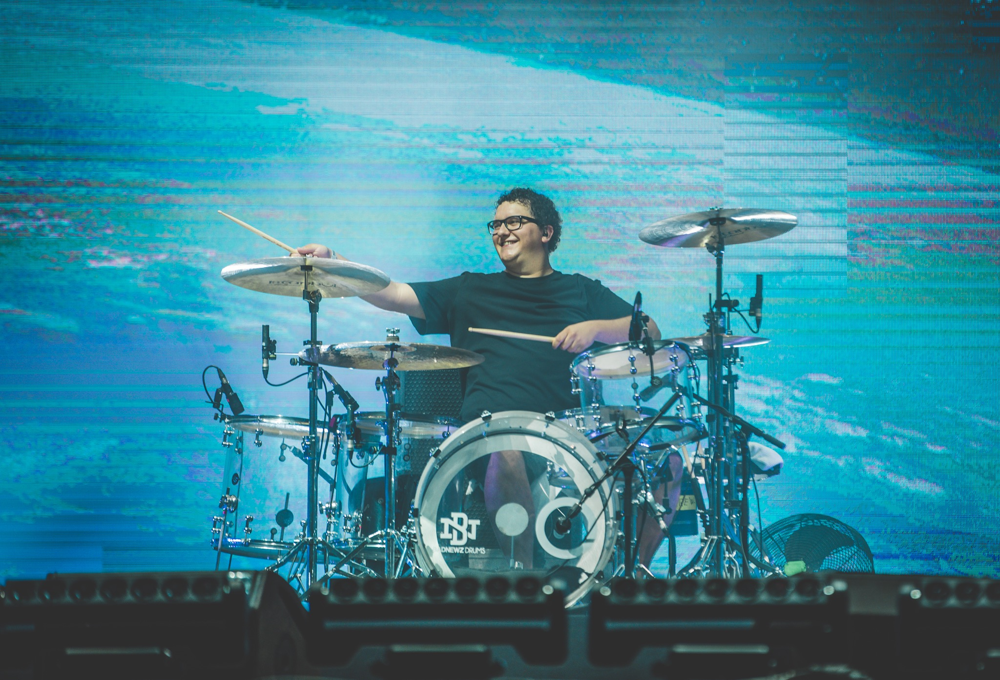 Berri Txarrak Lagunartean kontzertuaren irudiak. Kobetamendin, 2019ko uztailaren 14a. Gaizka Peñafielen argazkiak. Argazkiak edozein erabilerarako libre utzi ditu hemen aitortu duenaren arabera